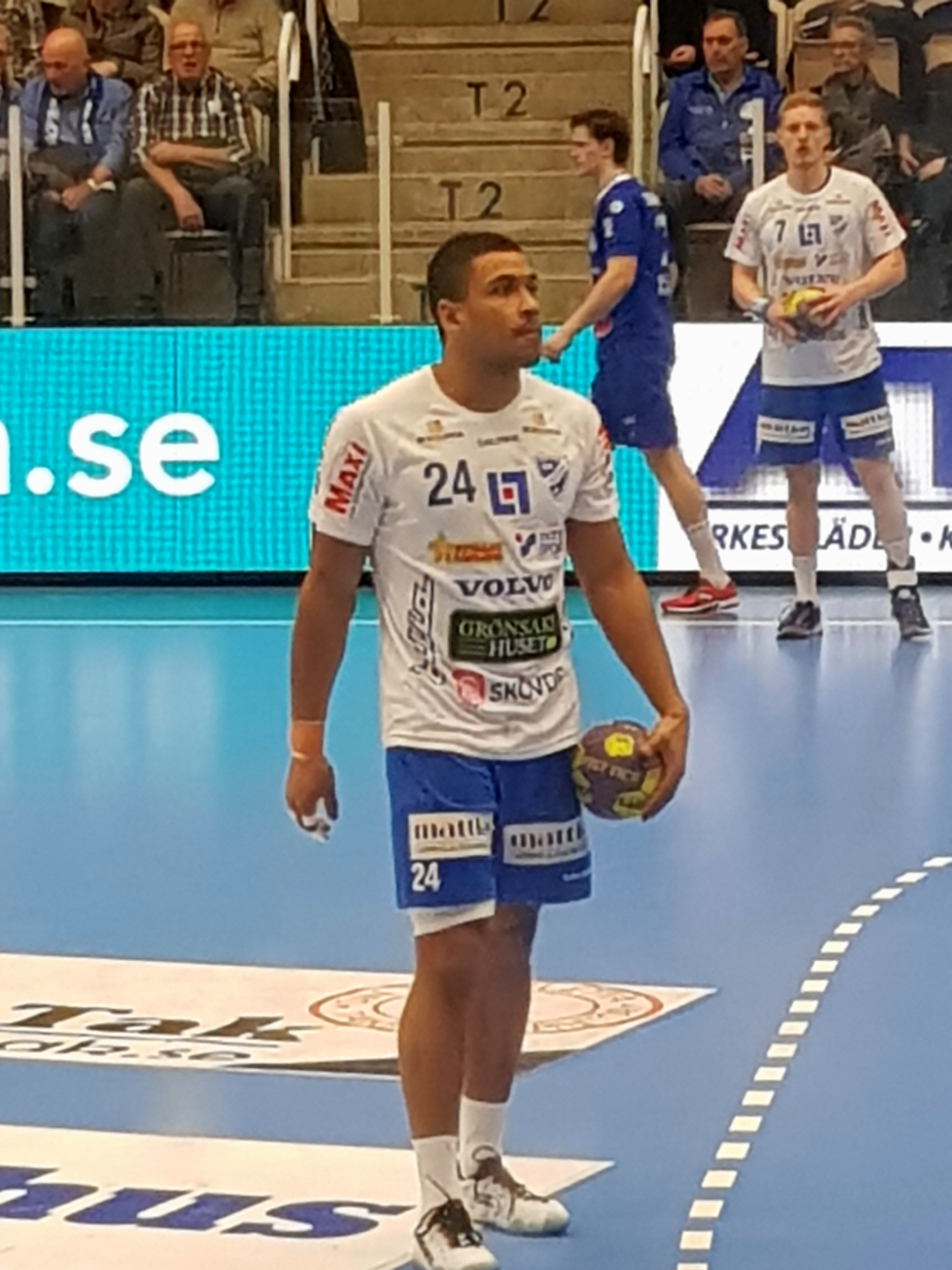 Miguel Mbumba IFK Skövde